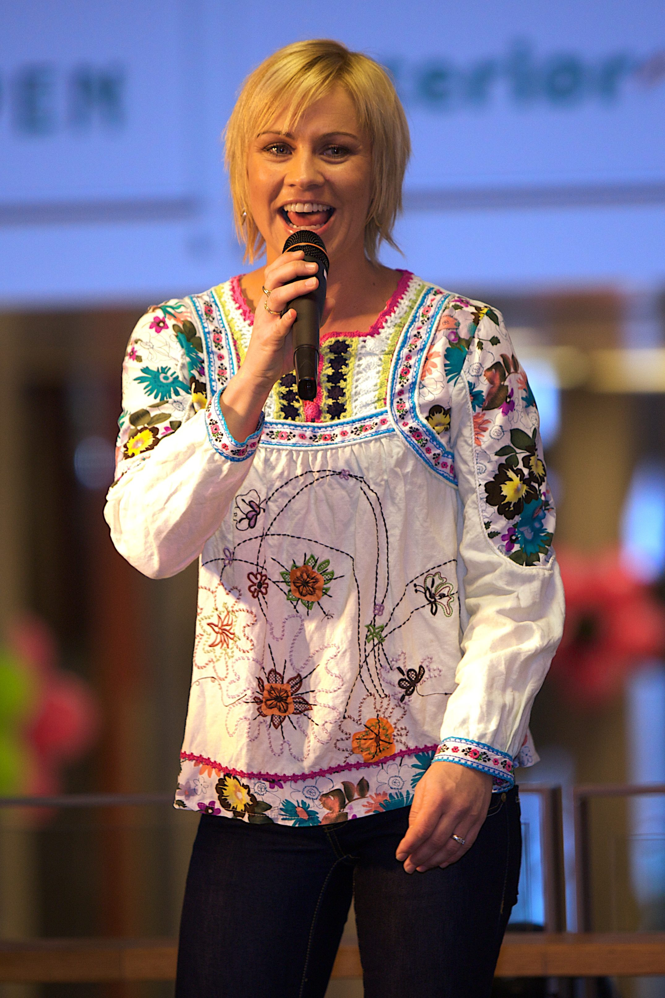 MGP Quiz på Herkules